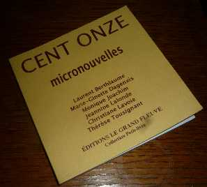 Premier ouvrage en français portant le terme "micronouvelle" dans son titre.